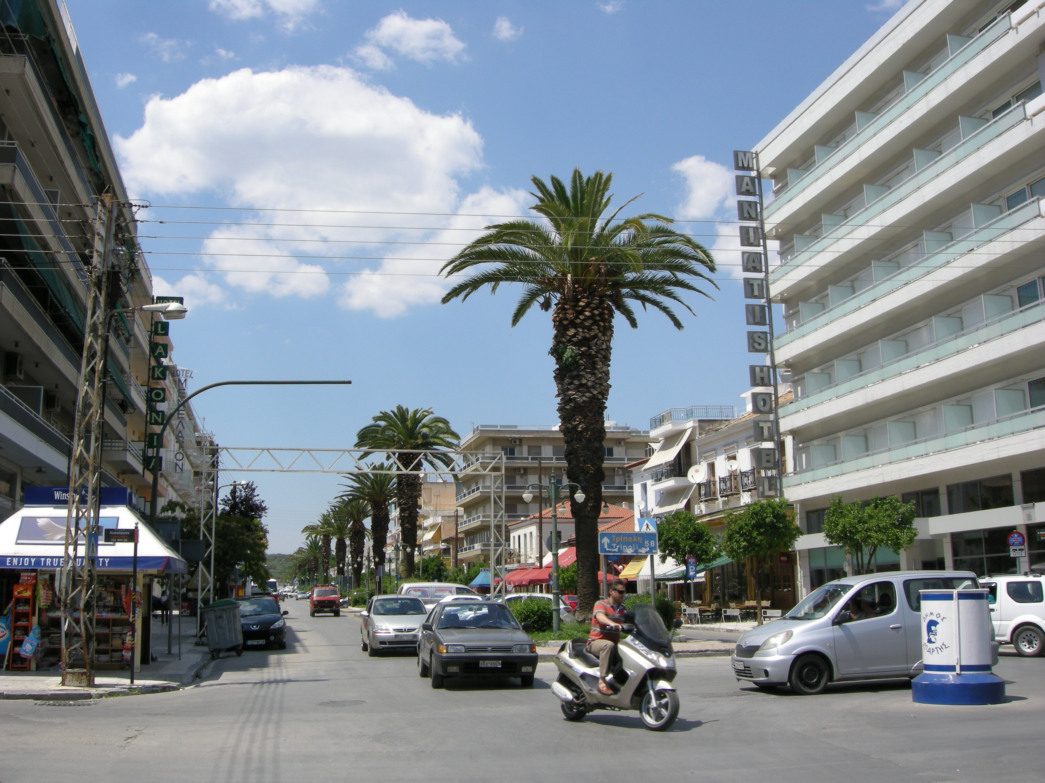 Modern Sparta